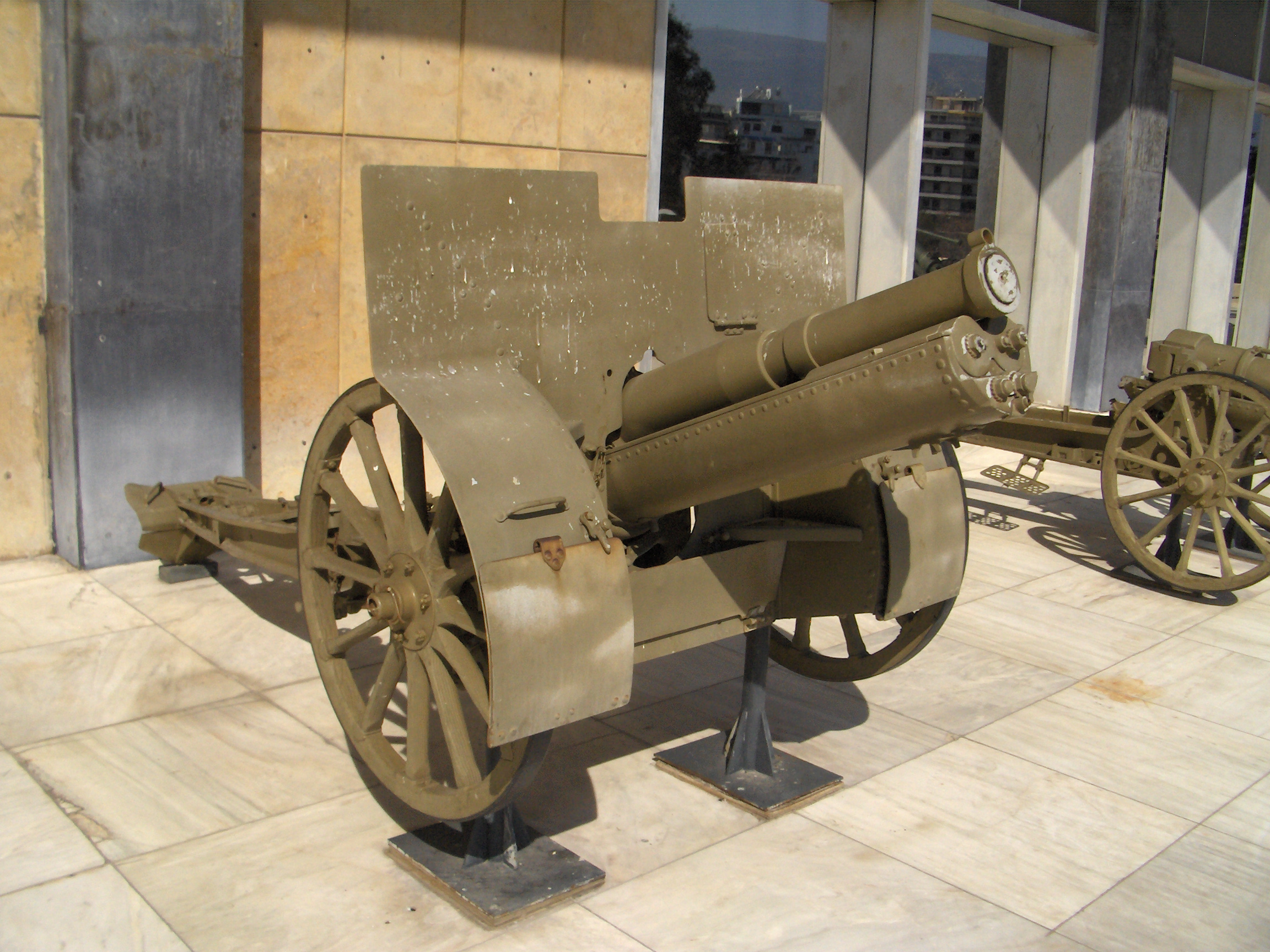 Exhibit at the War Museum in Athens. Schneider 1919 75mm mountain gun